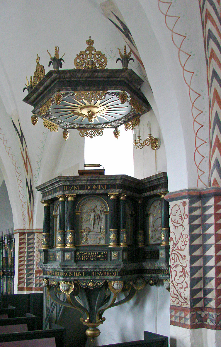 Prædikestol da: Østbirk Kirke ligger i Voer Herred i det tidligere Skanderborg Amt i Østjylland. Kirken hørte i middelalderen under Voer Kloster men præges nu af tilhørsforholdet til slægten Skram på Urup.